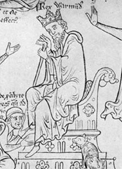 Offa, merciai király (ur.: 757-796) képe.